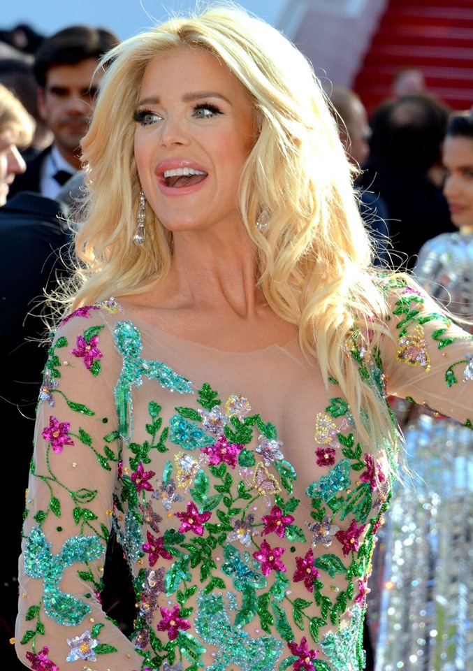 Victoria Silvstedt au Festival de Cannes 2019.